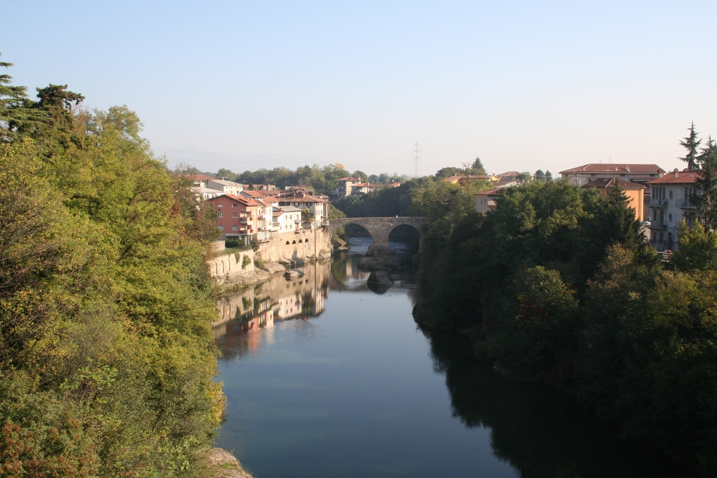 Brembate, Brembo River